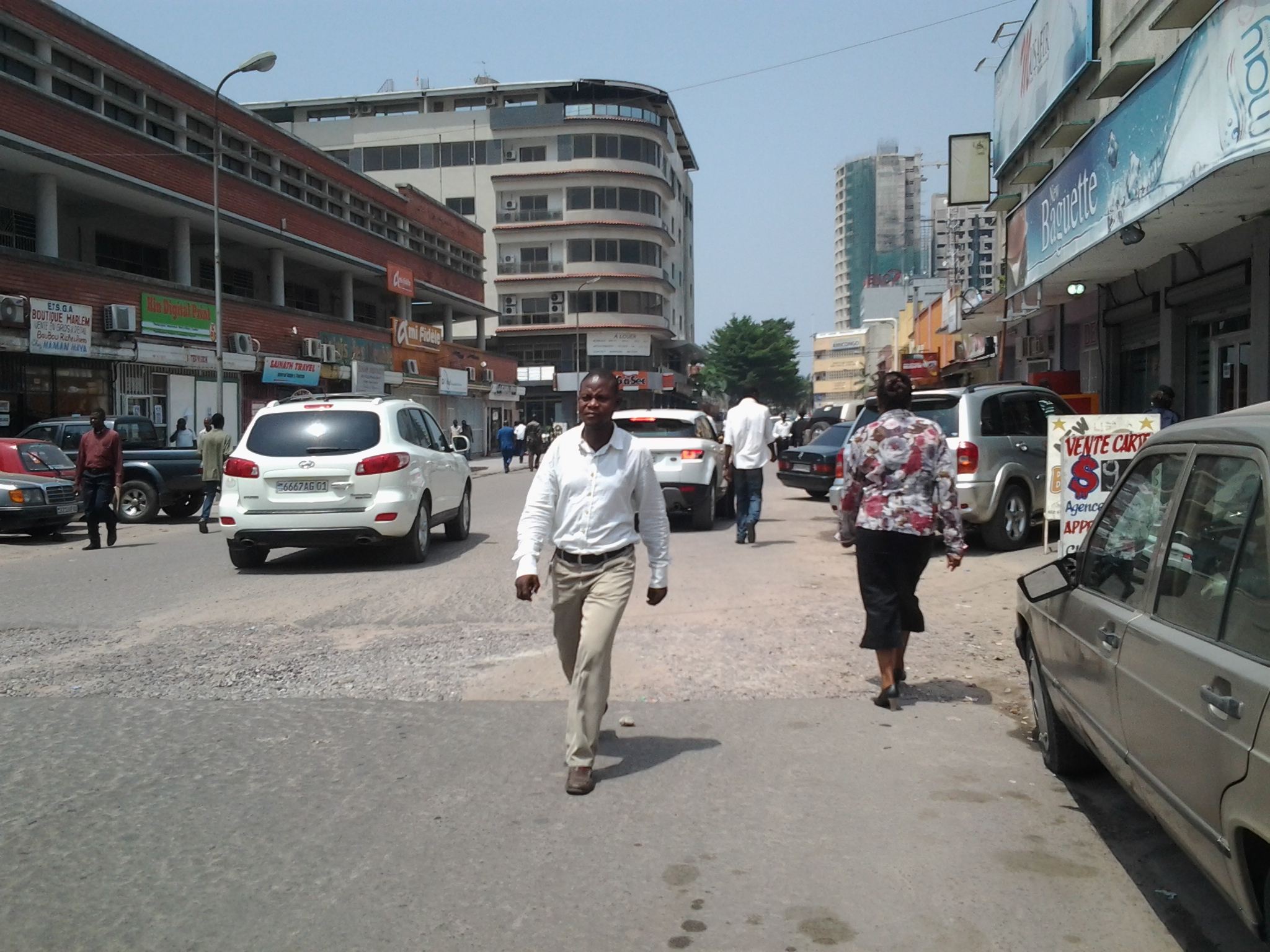 Kinshasa, République Démocratique du Congo - 2013